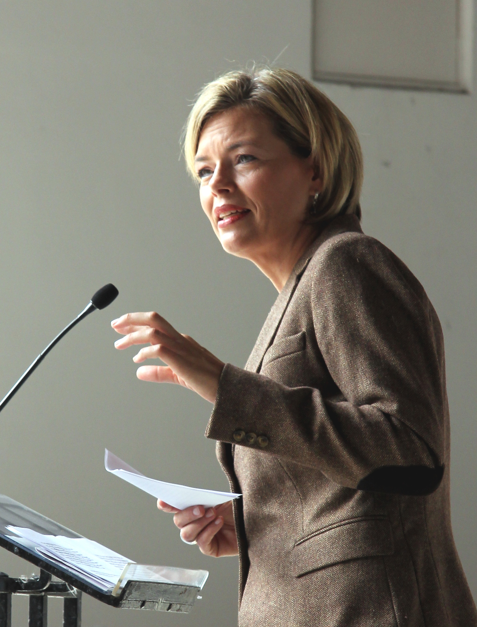 Julia Klöckner bei einer Veranstaltung des Kolpingwerks Diözesanverband Trier in Maria Martental